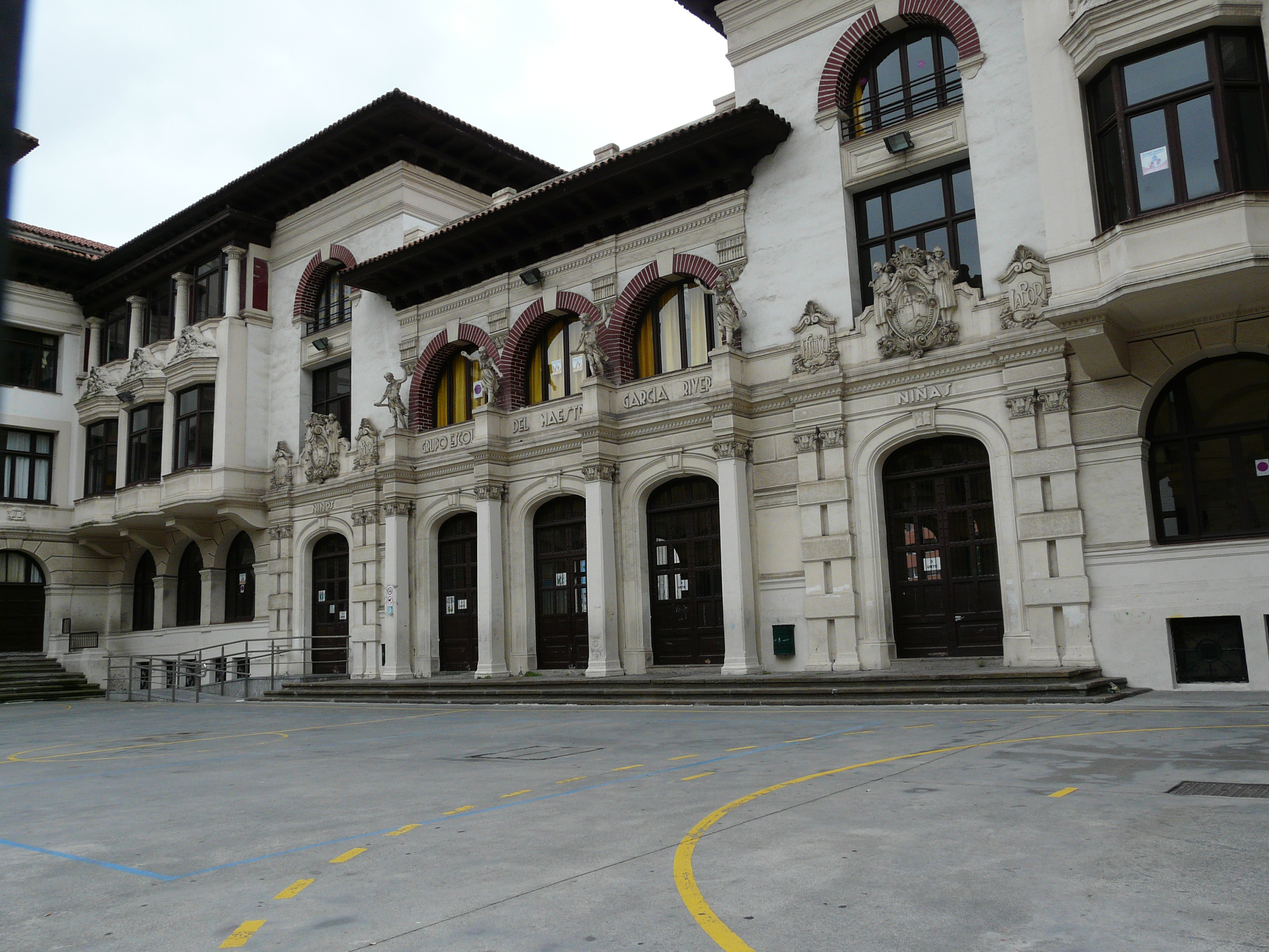 Escola Maestro García Rivero, a Bilbao.